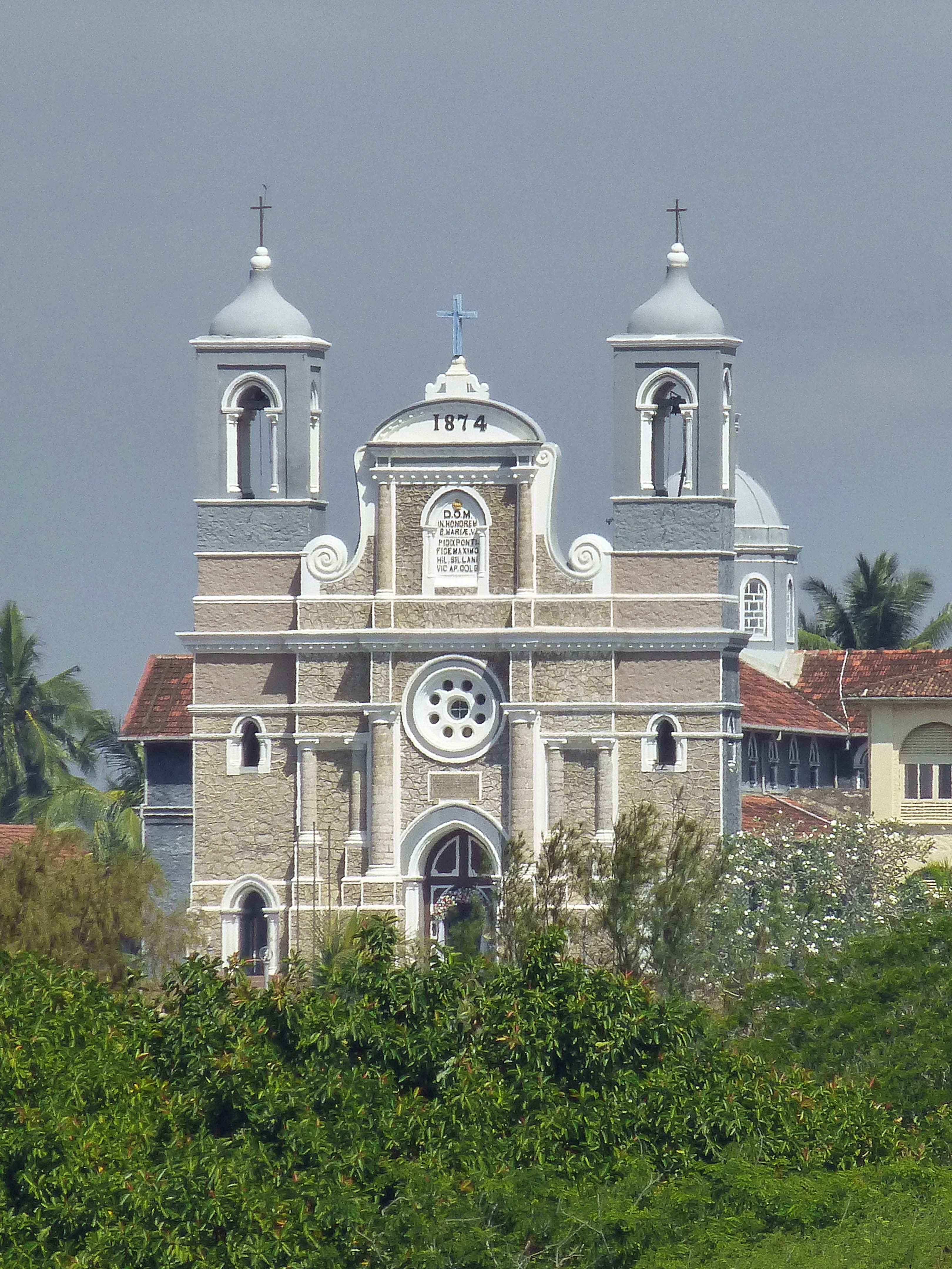 Cathédrale St-Mary à Galle (Sri Lanka)